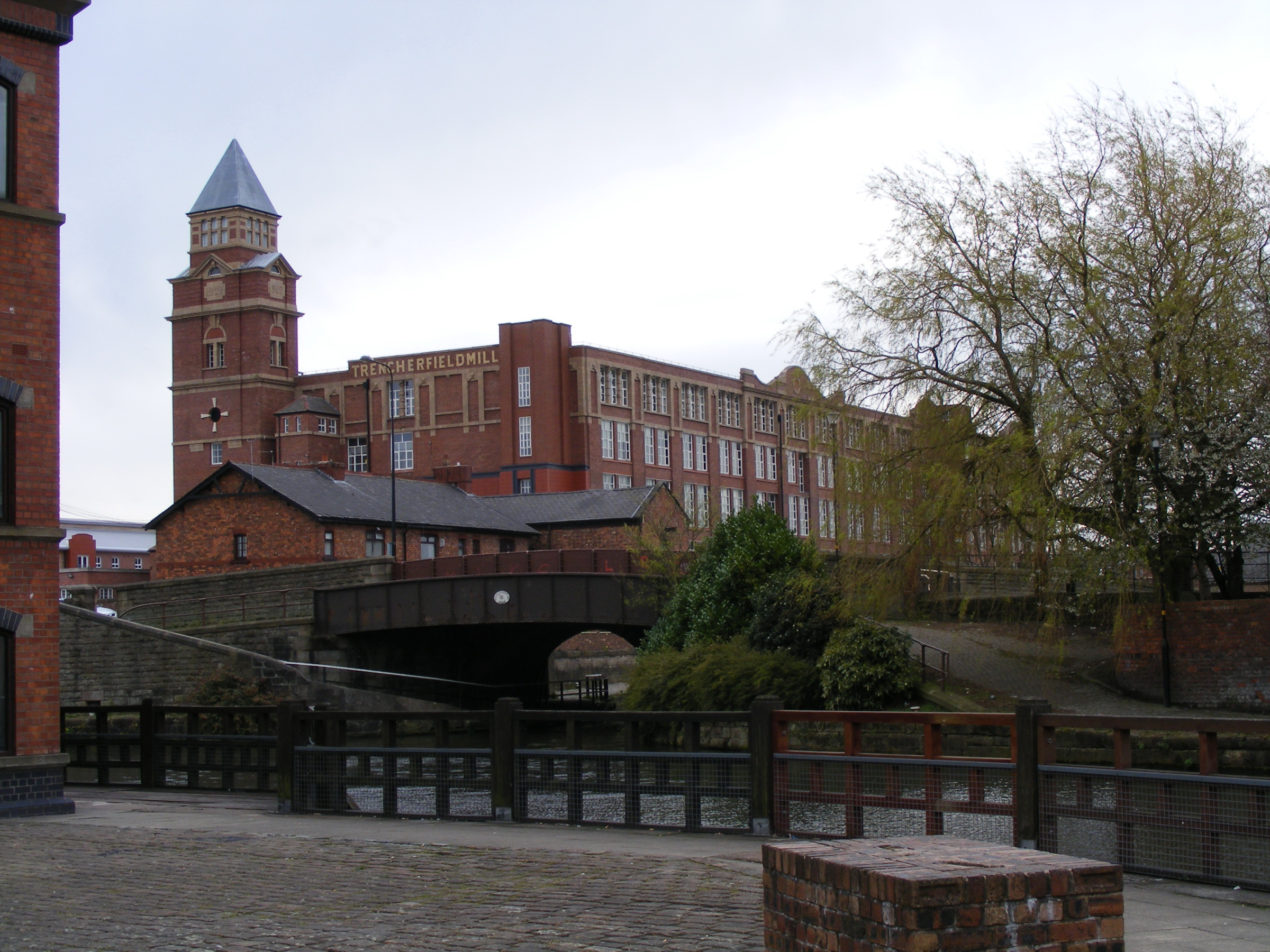 Trencherfield Mill in Wigan